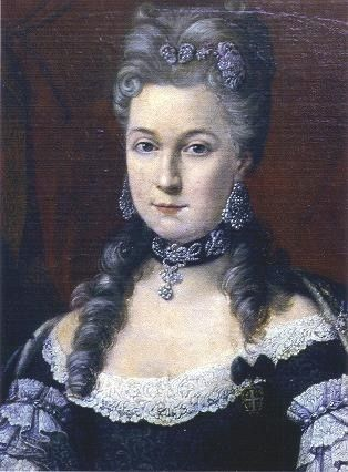 Martin van Meytens (1695–1770): Christine-Philippine-Élisabeth comtesse de Trazegnies, marquise de Herzelles (1728–1793), Erzieherin der einzigen Tochter Josephs II., dessen Heiratsantrag sie ablehnte, Korrespondentin Maria Theresias. Detail des Gemäldes in der Eingangshalle von Schloss Corroy-le-Château (bei Gembloux).